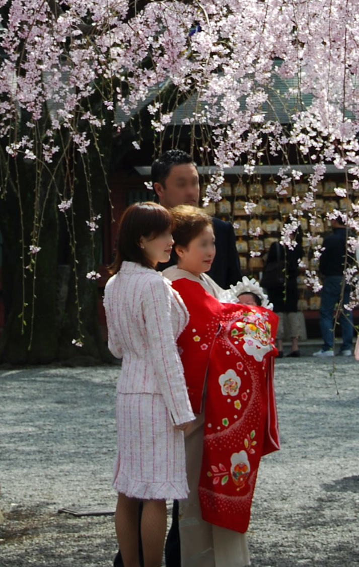 東京都府中市の大国魂神社にて、お宮参りの親子連れ。個人が特定できないようにぼかしをいれた。